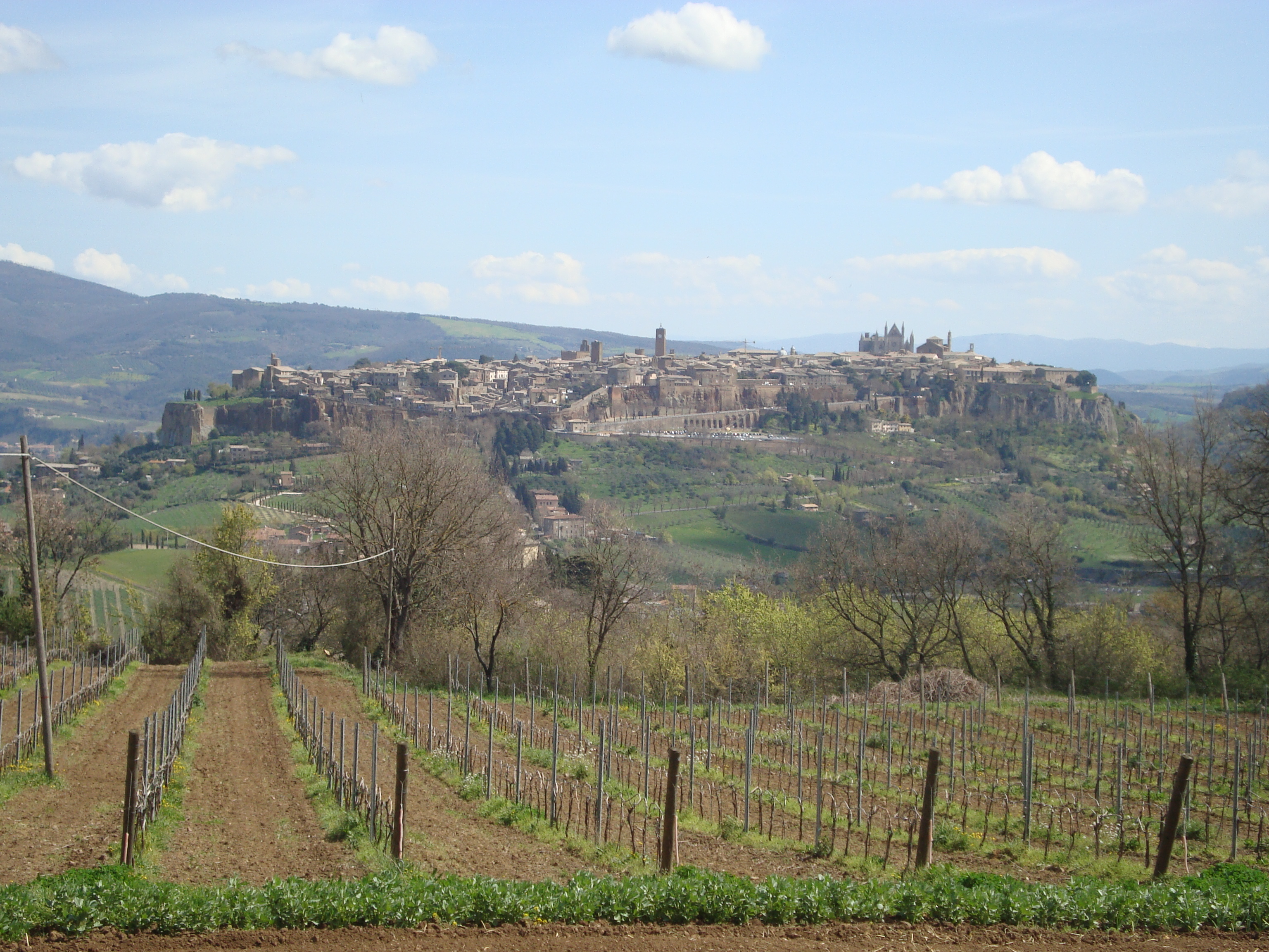 Vue général de la colline d'Orvieto